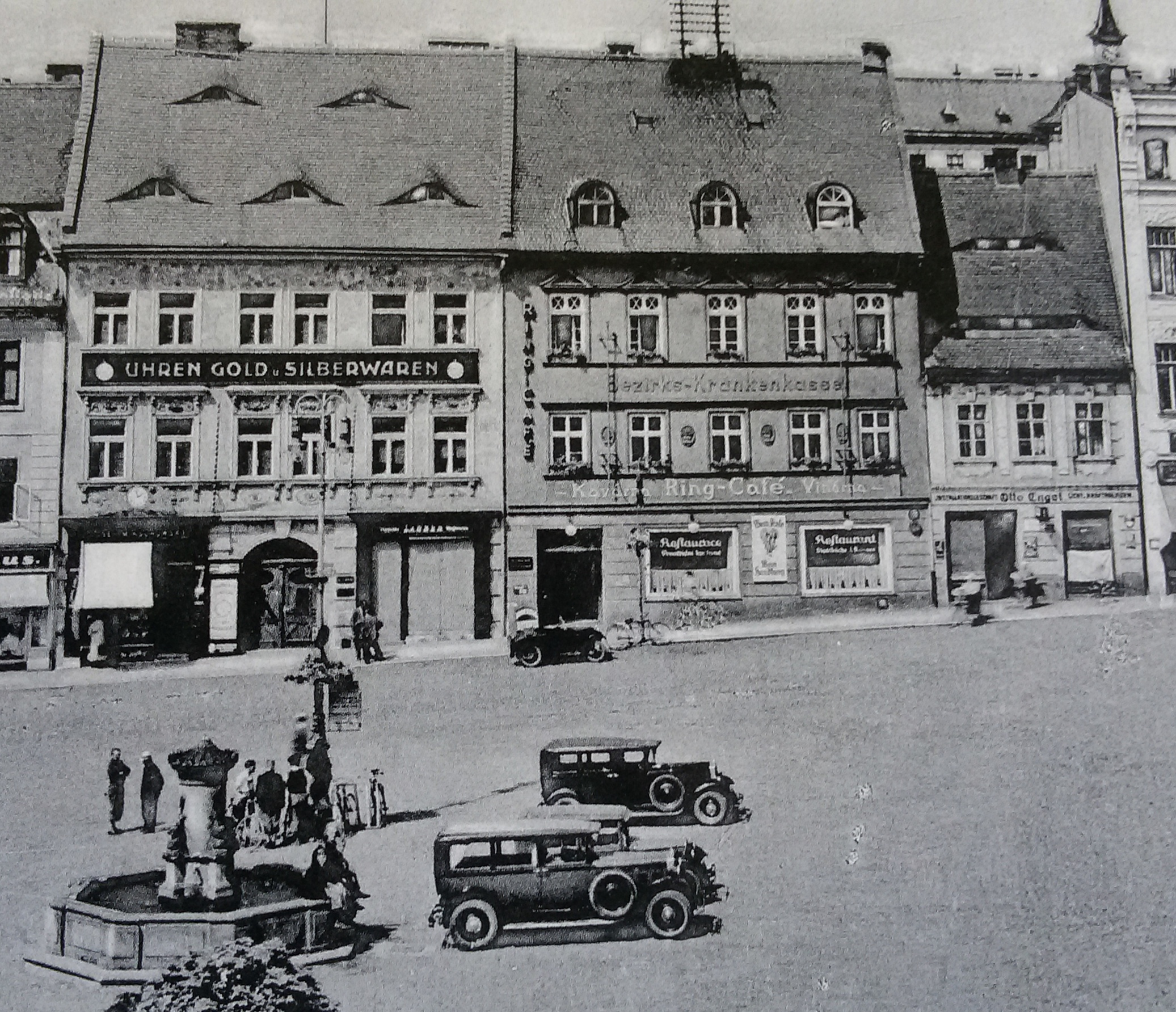 Česká Lípa, budova č.p.170, vinárna Ring Café, na pohlednici z dob 1.republiky, nyní Městská knihovna